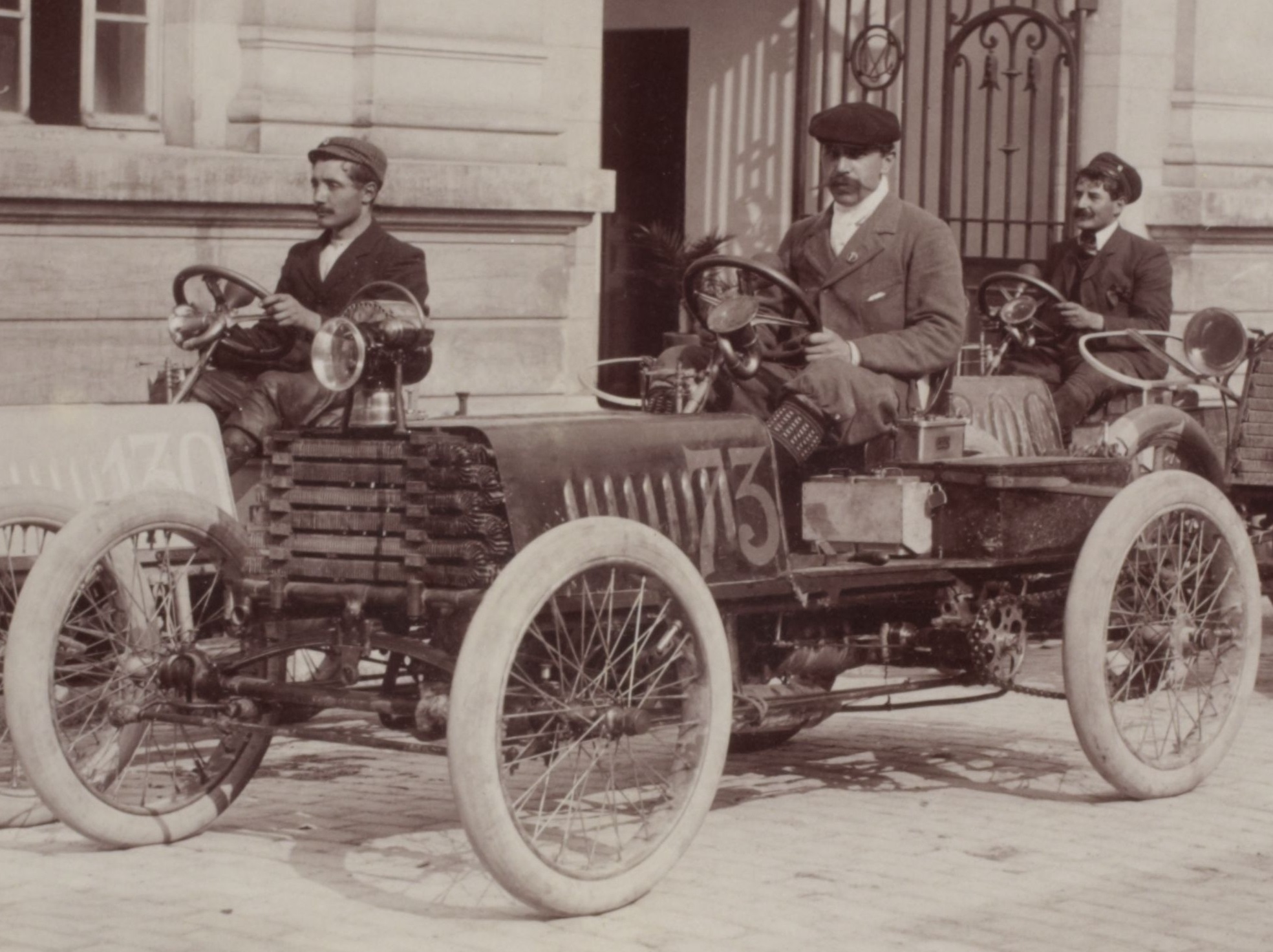 [Collection Jules Beau. Photographie sportive] : T. 21. Année 1903 / Jules Beau : F. 36. [Paris - Madrid, Versailles, 24 mai 1903]